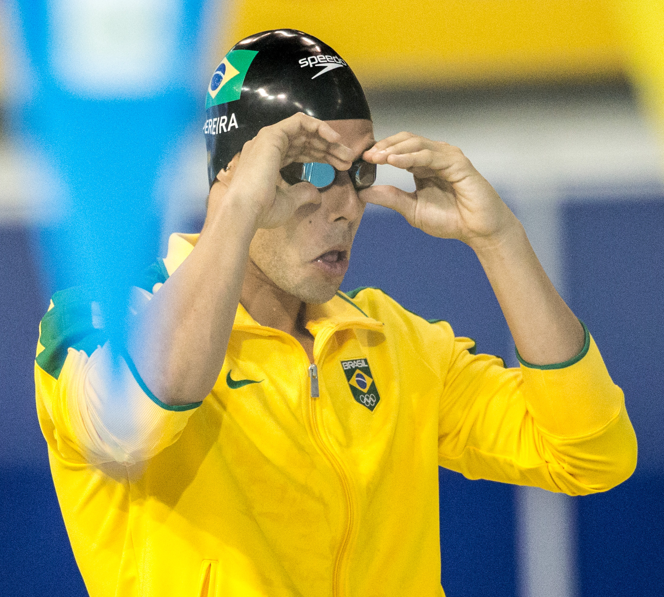 Toronto - Canada - 15/07/2015 Jogos Panamericanos 2015. Finais das provas de natacao no CIBCAquatic Cente. Na foto Thiago Pereira durante a prova dos 400m medley. Foto: Jonne Roriz/Exemplus/COB